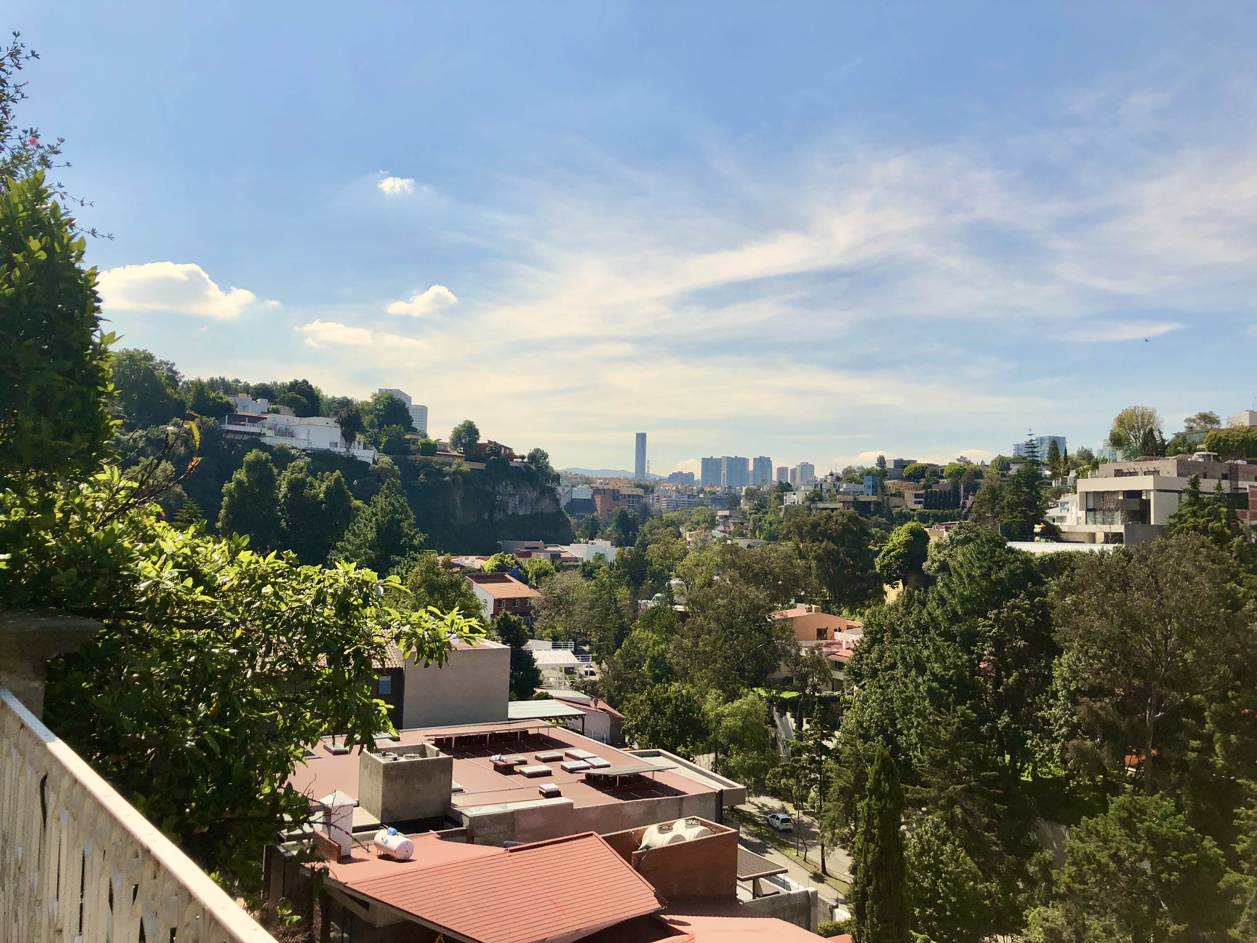 Bosques 2018